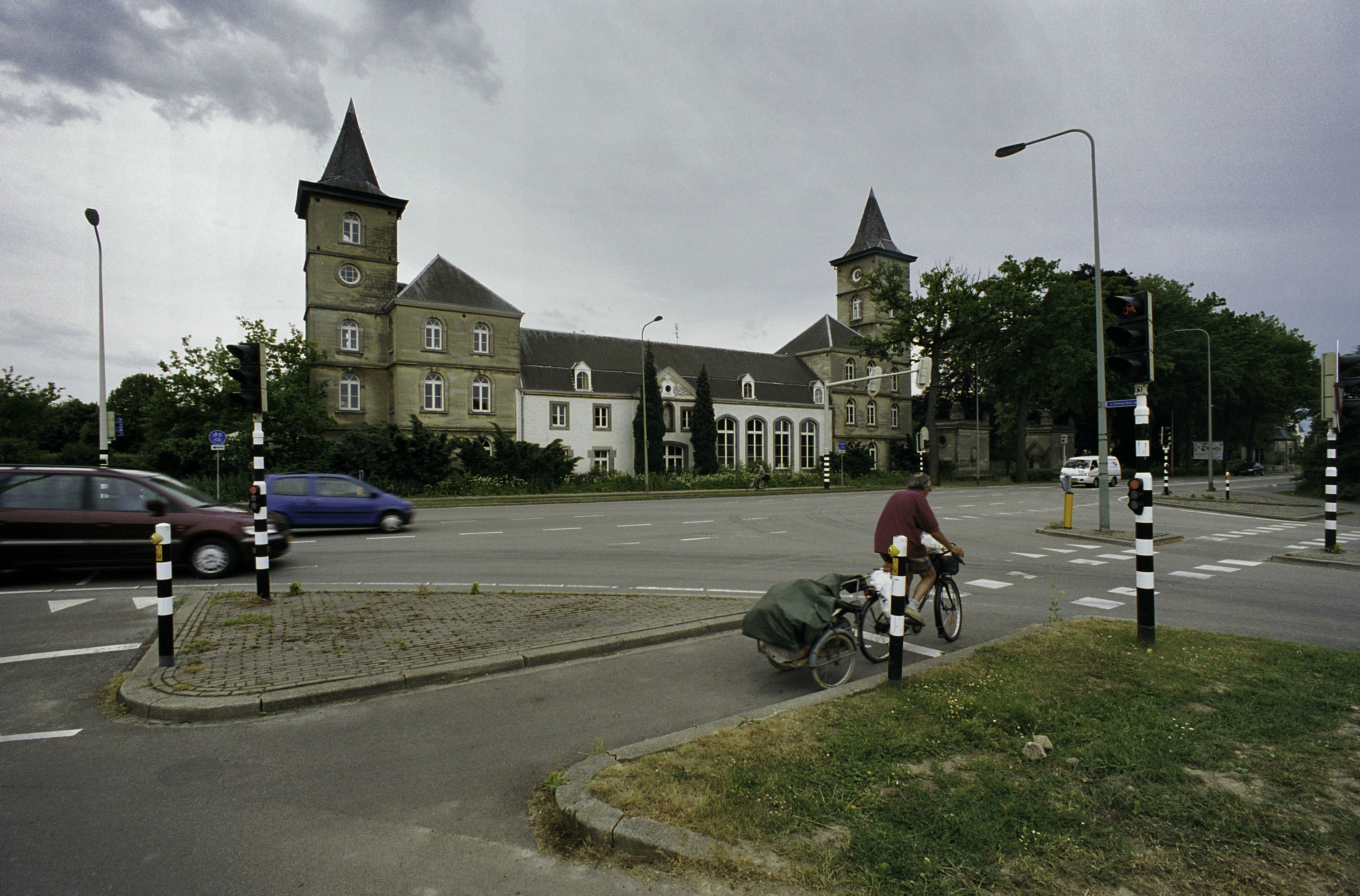 La Grande Suisse: Overzicht van de westvleugel met aan weerszijden een toren, thans een appartementencomplex, gezien vanaf de straat (opmerking: Gefotografeerd voor Kastelen in Limburg (1000-1800), Burchten en landhuizen, bladzijde 361)